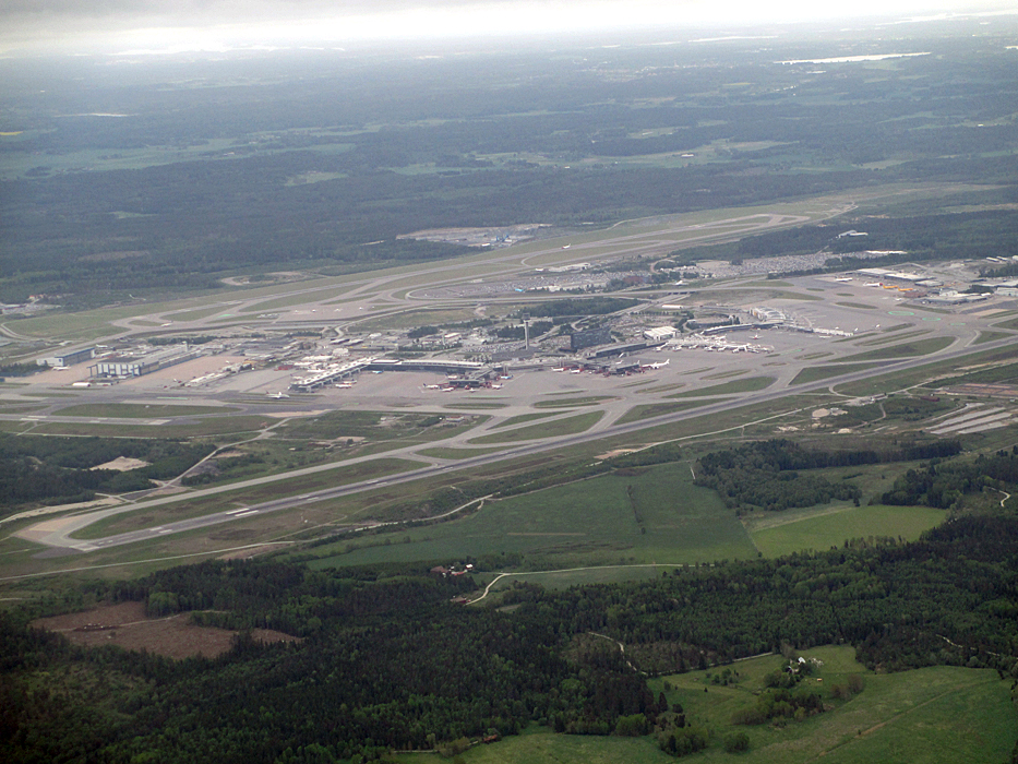 Flughafen Arlanda, Stockholm